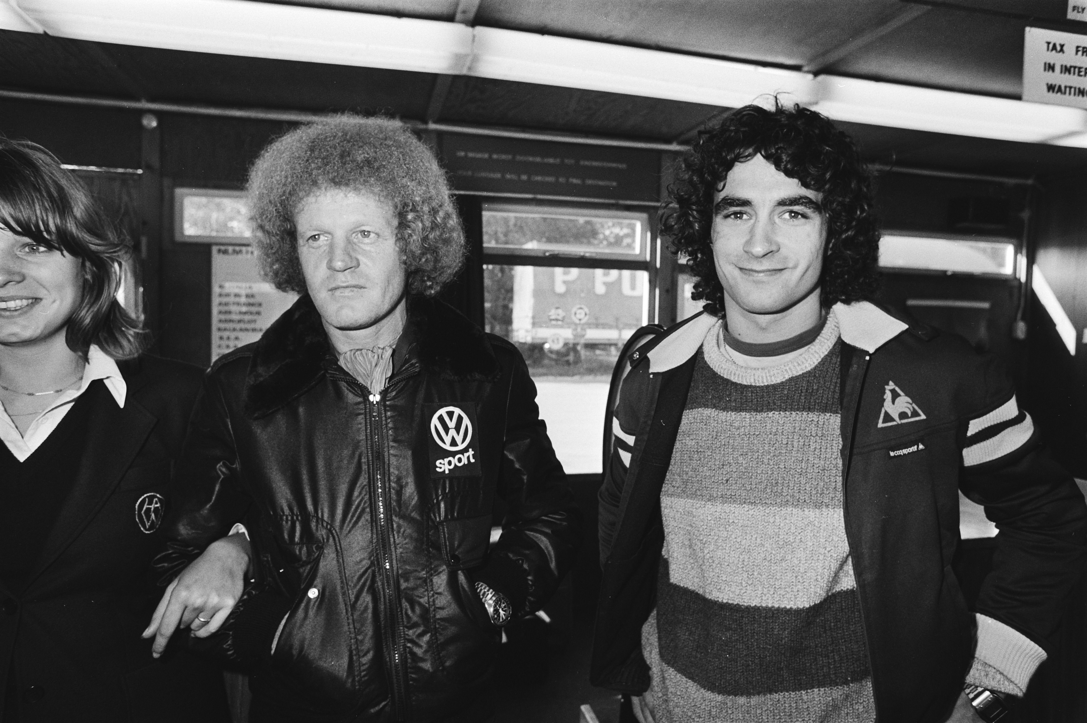 Collectie / Archief : Fotocollectie Anefo Reportage / Serie : Voetbalclub St. Etienne arriveert op vliegveld Welschap voor de voetbalwedstrijd in het kader van de Europacup tegen PSV Beschrijving : Trainer Herbin en Rocheteau Datum : 23 oktober 1979 Locatie : Eindhoven Airport Trefwoorden : sport, trainers, voetbal, voetballers Persoonsnaam : Herbin, Robert, Rocheteau, Dominique Fotograaf : Croes, Rob C. / Anefo Auteursrechthebbende : Nationaal Archief Materiaalsoort : Negatief (zwart/wit) Nummer archiefinventaris : bekijk toegang 2.24.01.05 Bestanddeelnummer : 930-5060